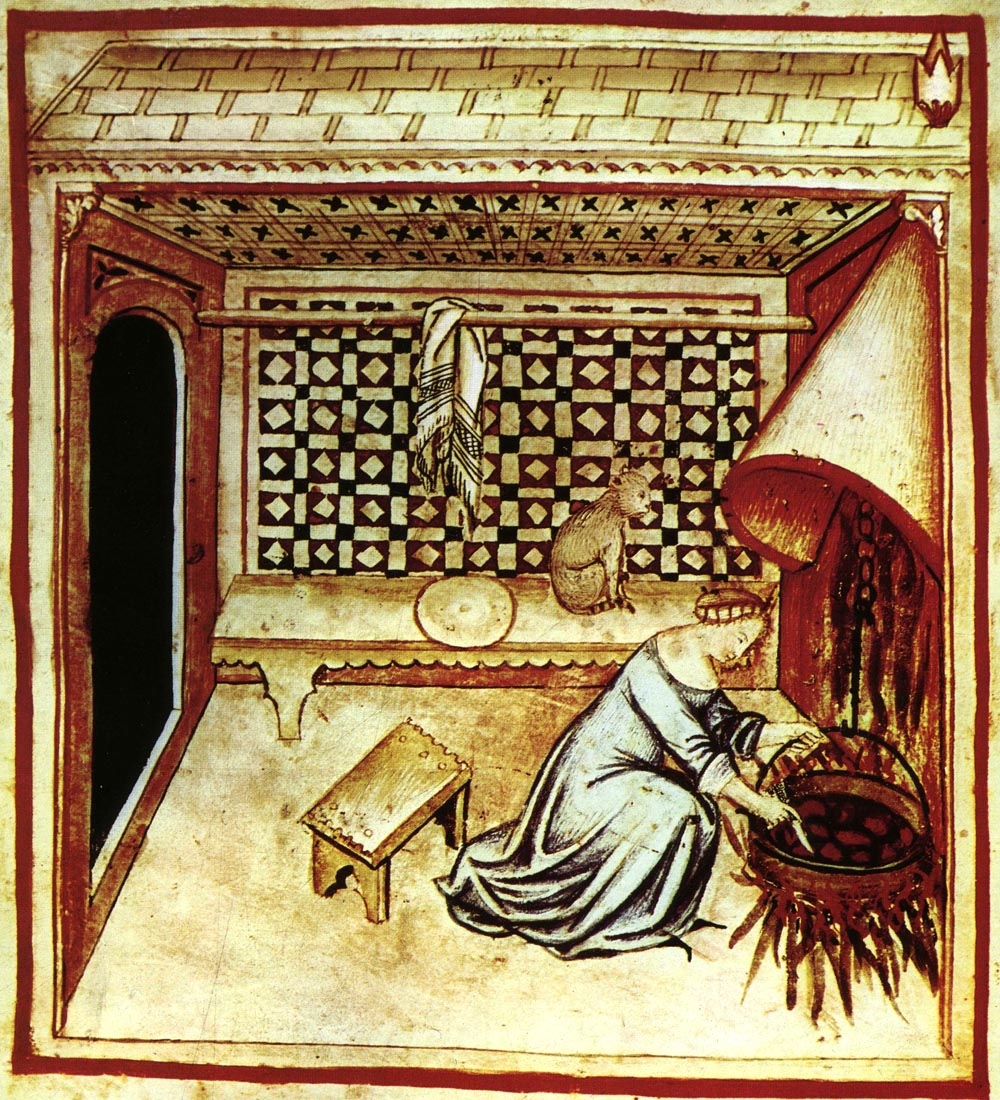 Tacuina sanitatis (XIV century)